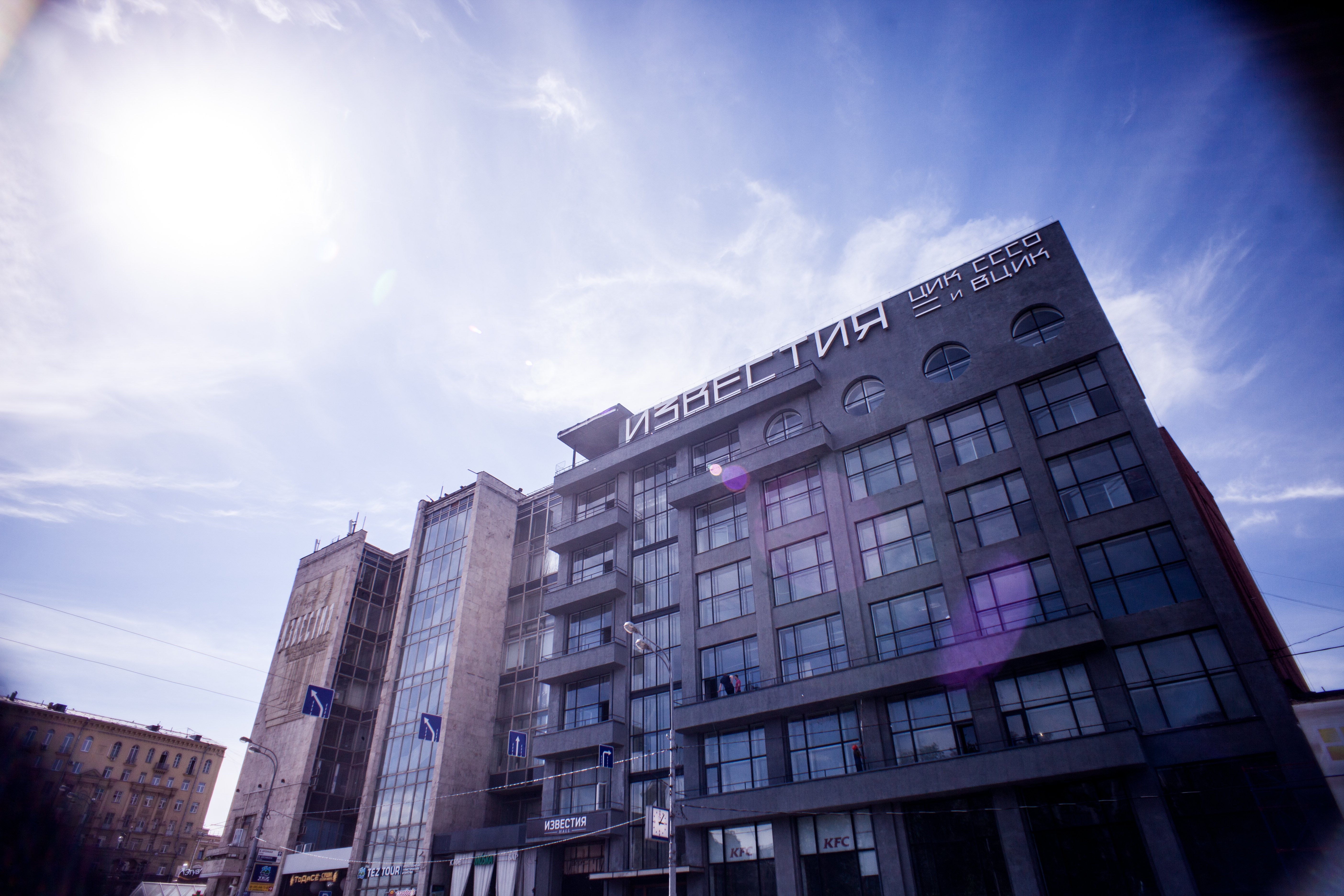 Здание редакции газеты «Известия»